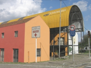 Rua da Cidadania